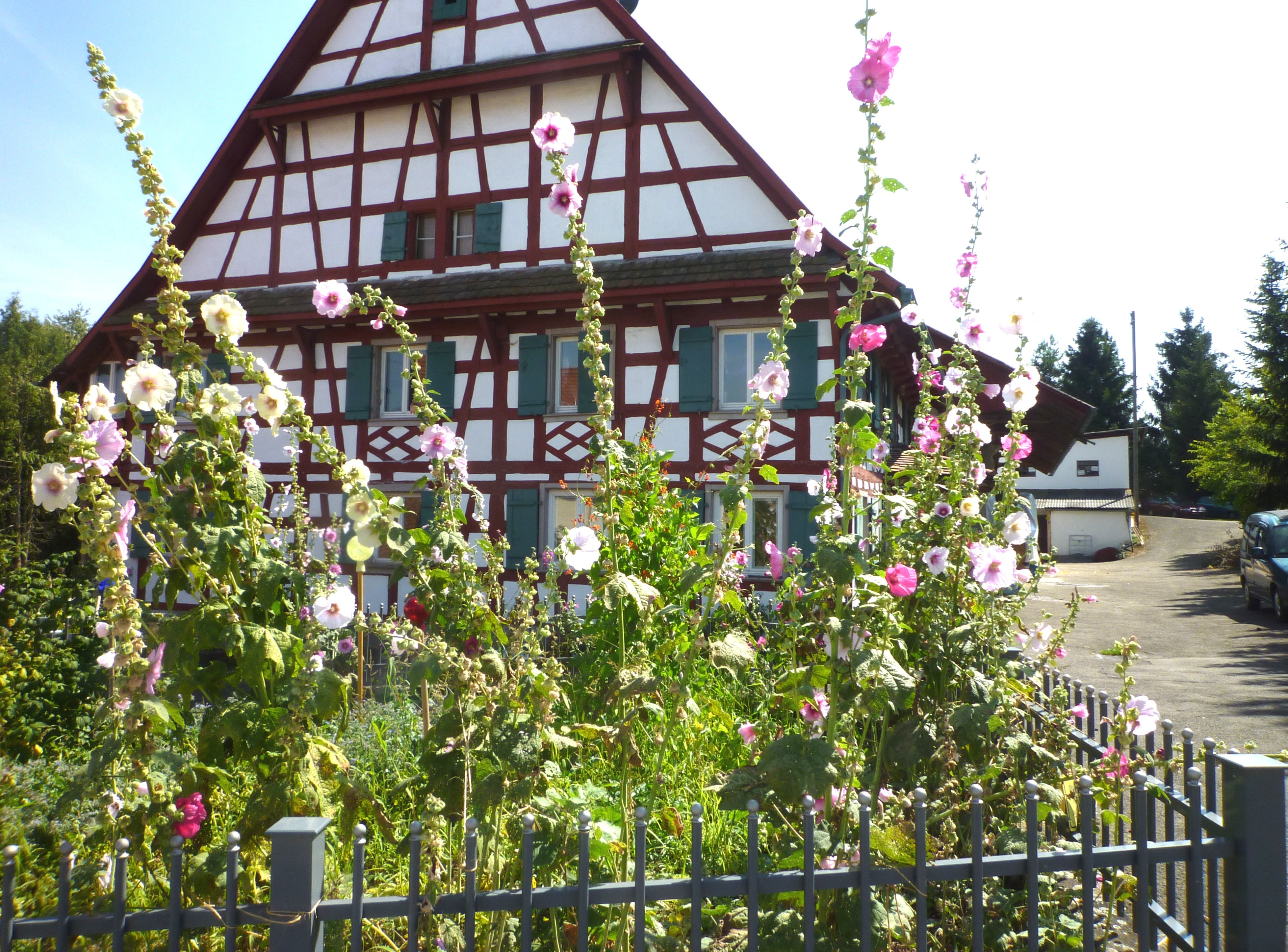 Dürnau - Fachwerkhaus mit Vorgarten